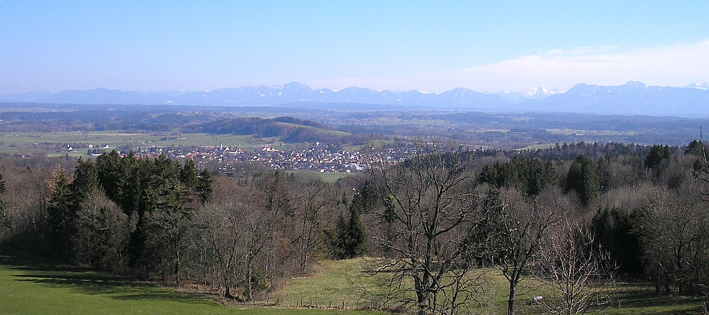 Blick vom Hohen Peißenberg (Windkreuth) auf den Ort Peißenberg (Landkreis Weilheim-Schongau, Oberbayern). Eigene Aufnahme, März 2007 / Total view of Peissenberg (Upper Bavaria, Germany) from Windkreuth (Mount Hoher Peissenberg). Own photo, March 2007